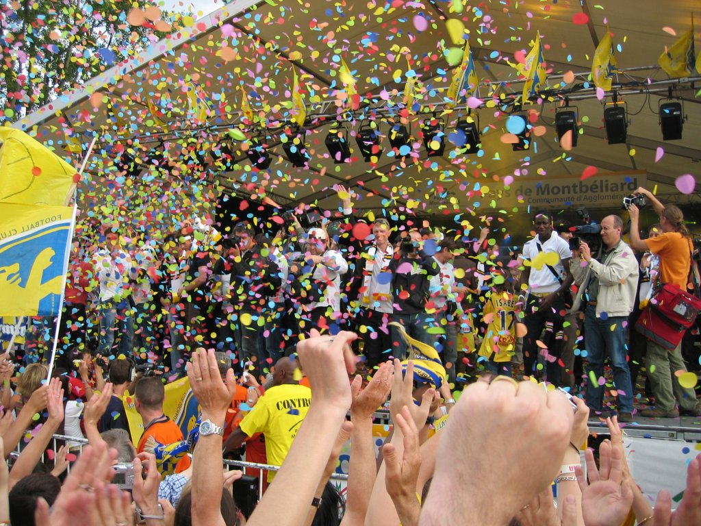 Retour éqauipe de Sochaux Coupe de France 2007 au Stade Bonale de Sochaux et supporters